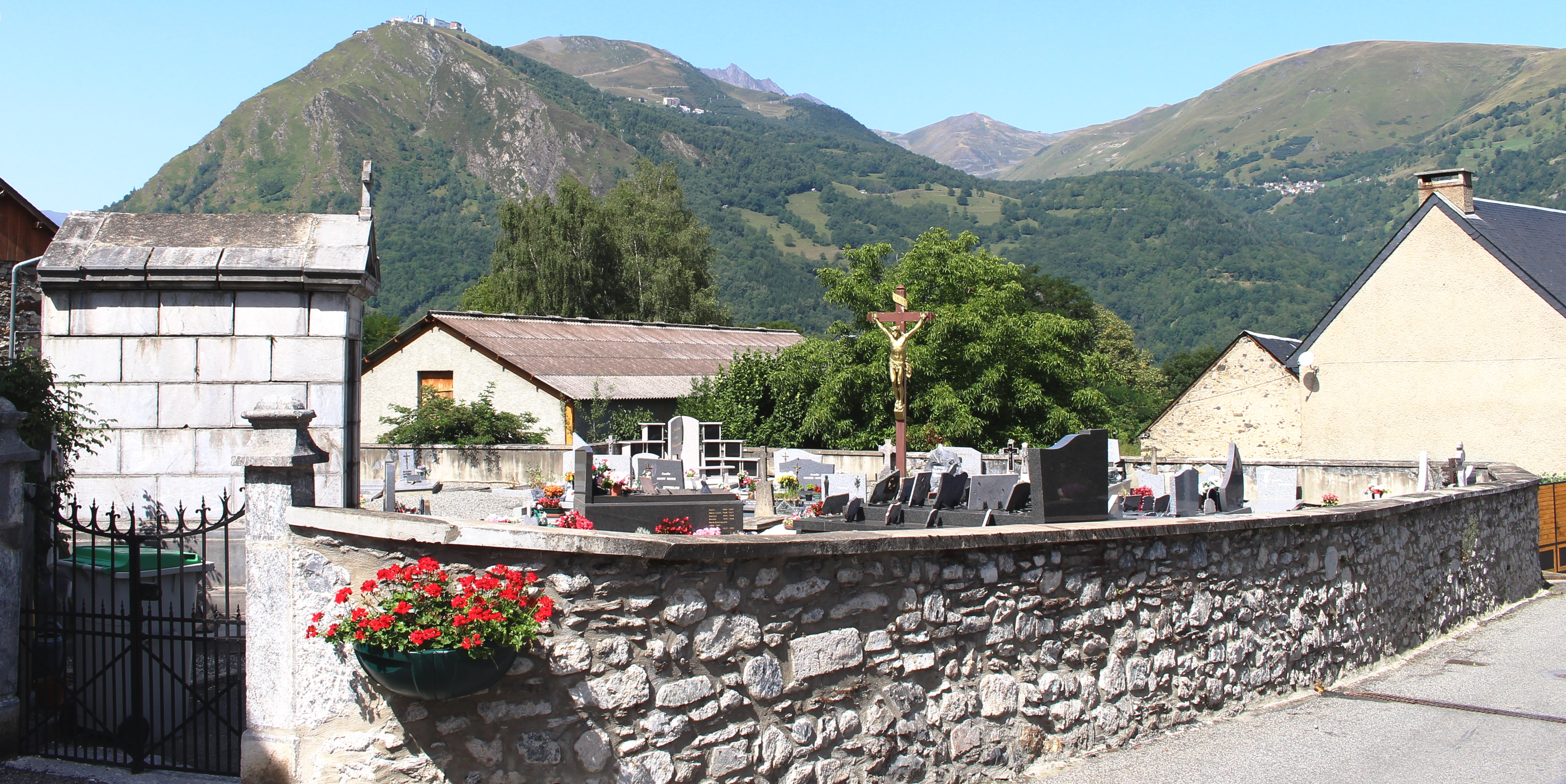 Cimetière de Sailhan (Hautes-Pyrénées)